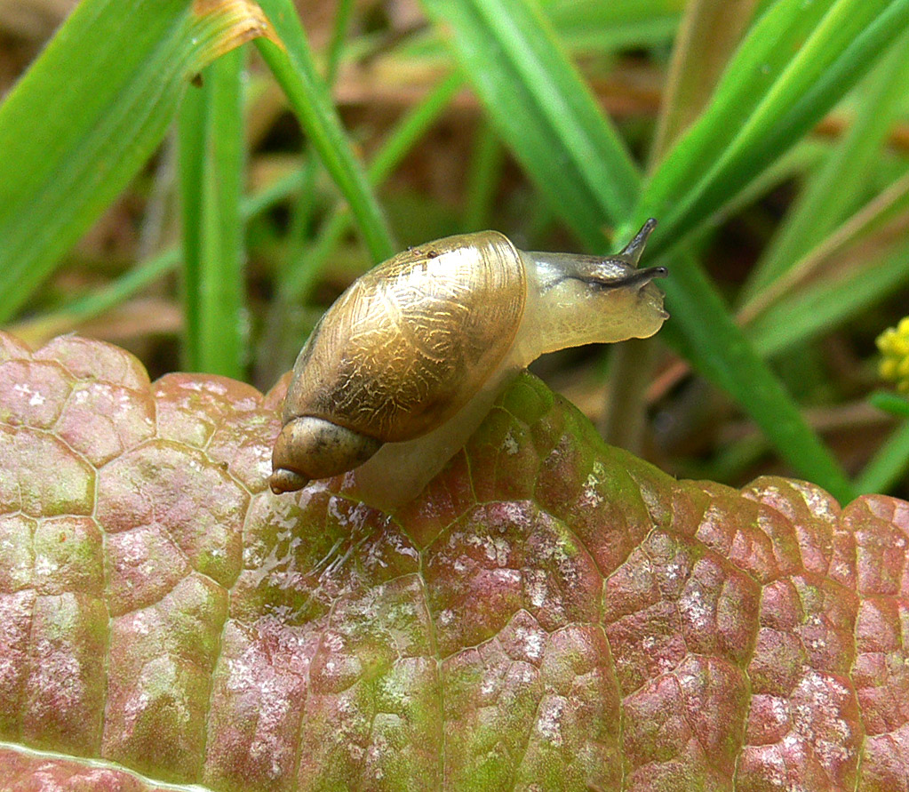 Ambrette commune, trouvée près de la rivière La Marque, près de Lille, Nord de la france